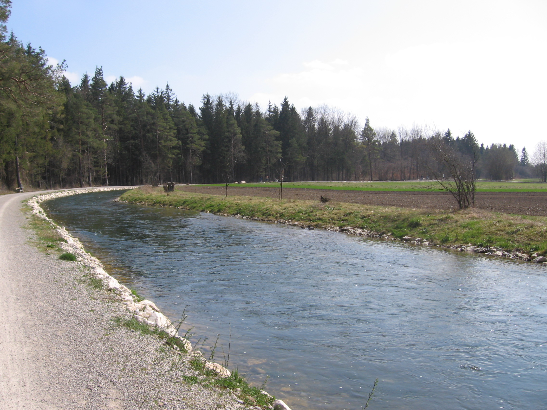 Lochbach am Siebentischwald/Stadtwald Augsburg